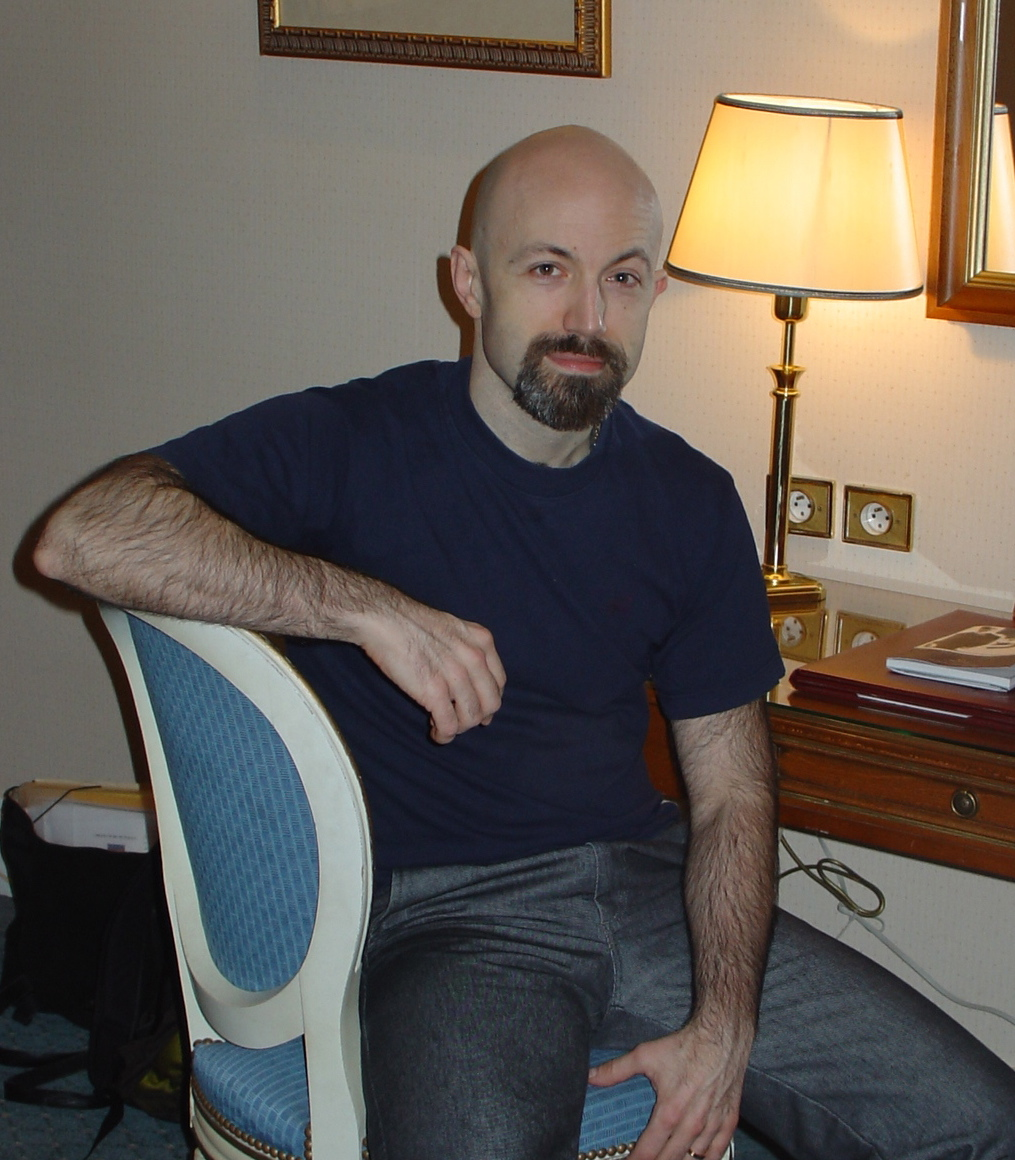 Photo de Shazz